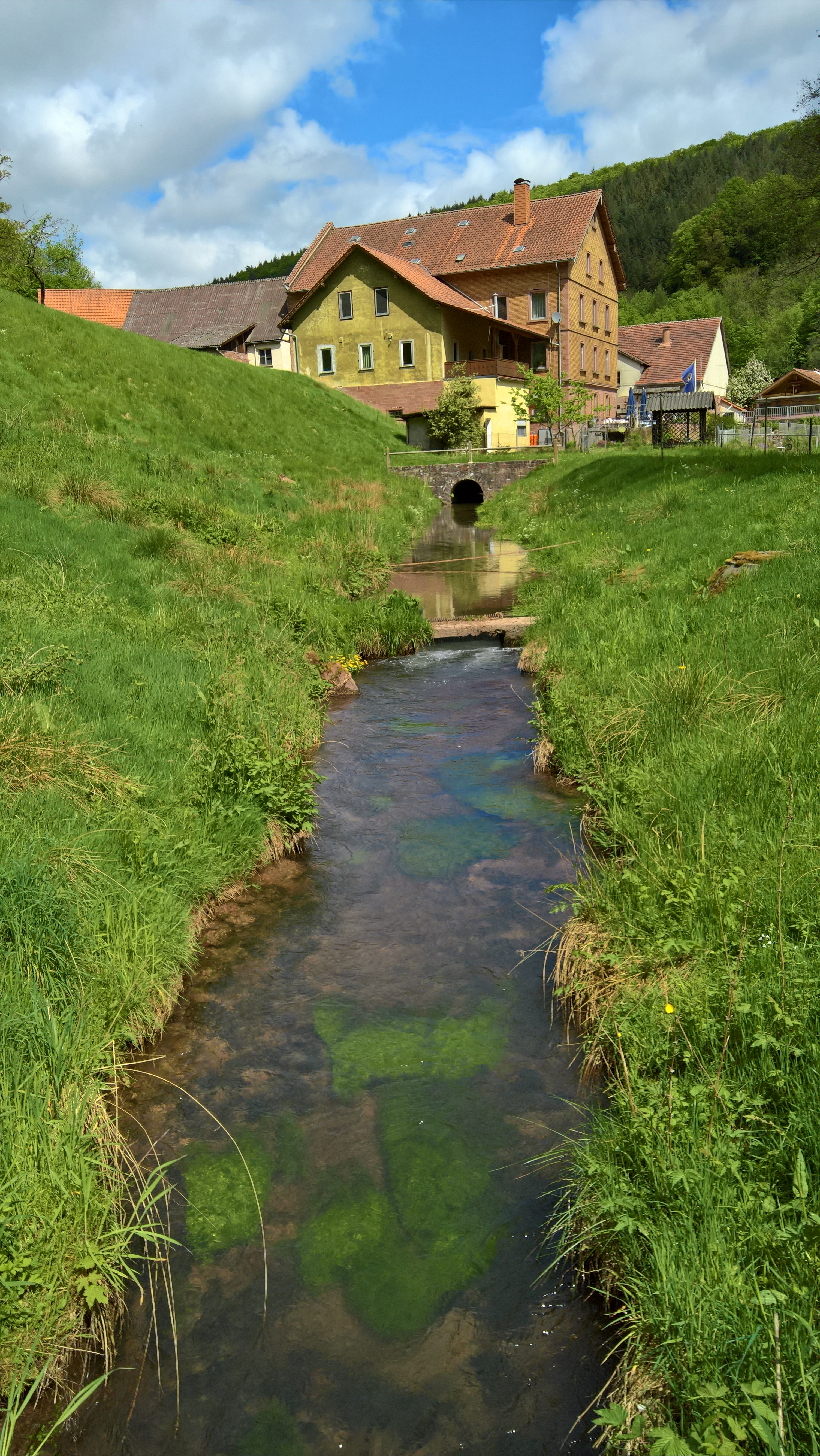 Blick vom Mühlensteg, der parallel zum Haslochbach verläuft, zur Schreckemühle